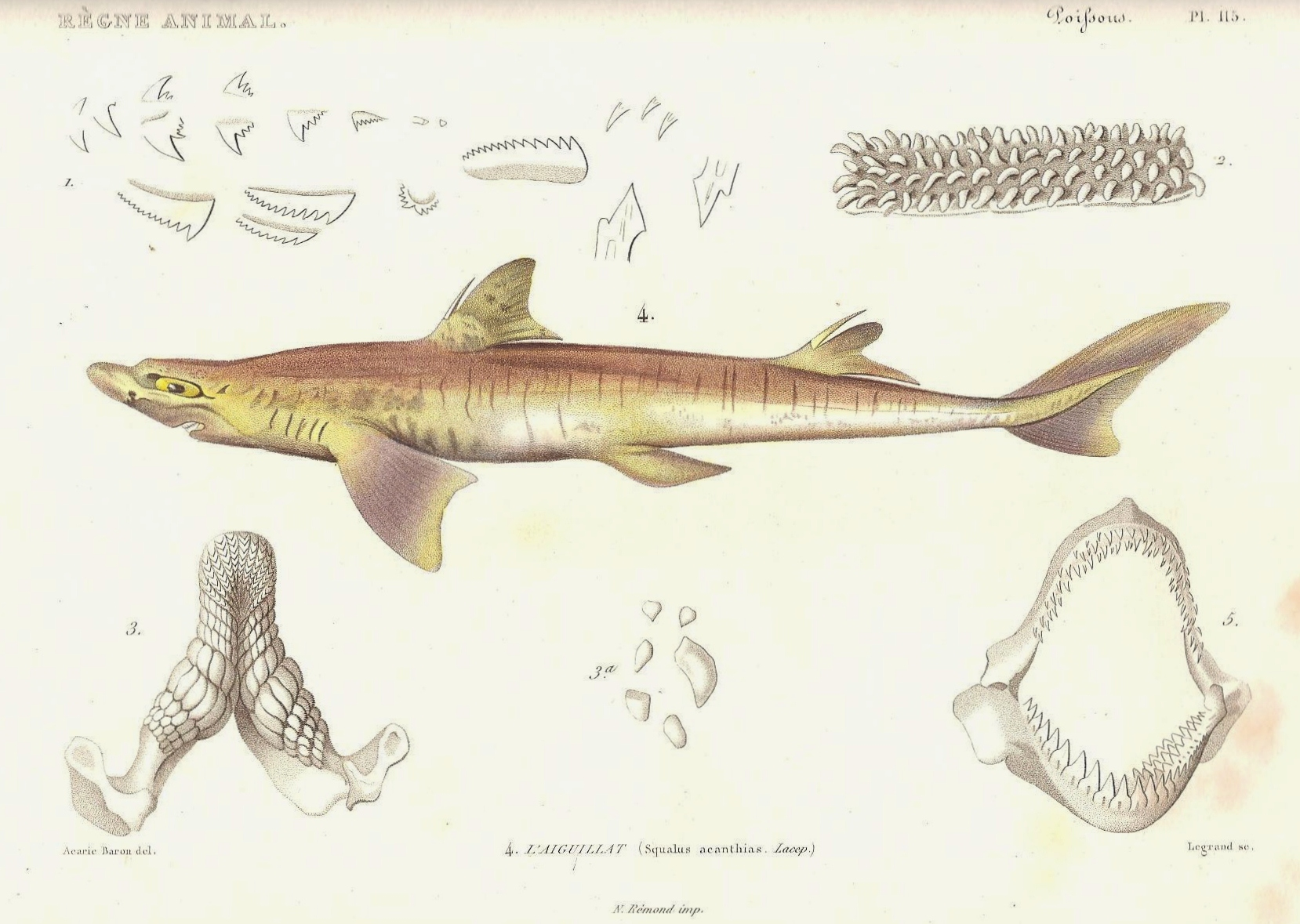 Planche N° 115 du livre "Le règne animal distribué d'après son organisation" par Georges Cuvier (Tome 8), seconde édition de 1828, représentant Spinax Acanthias